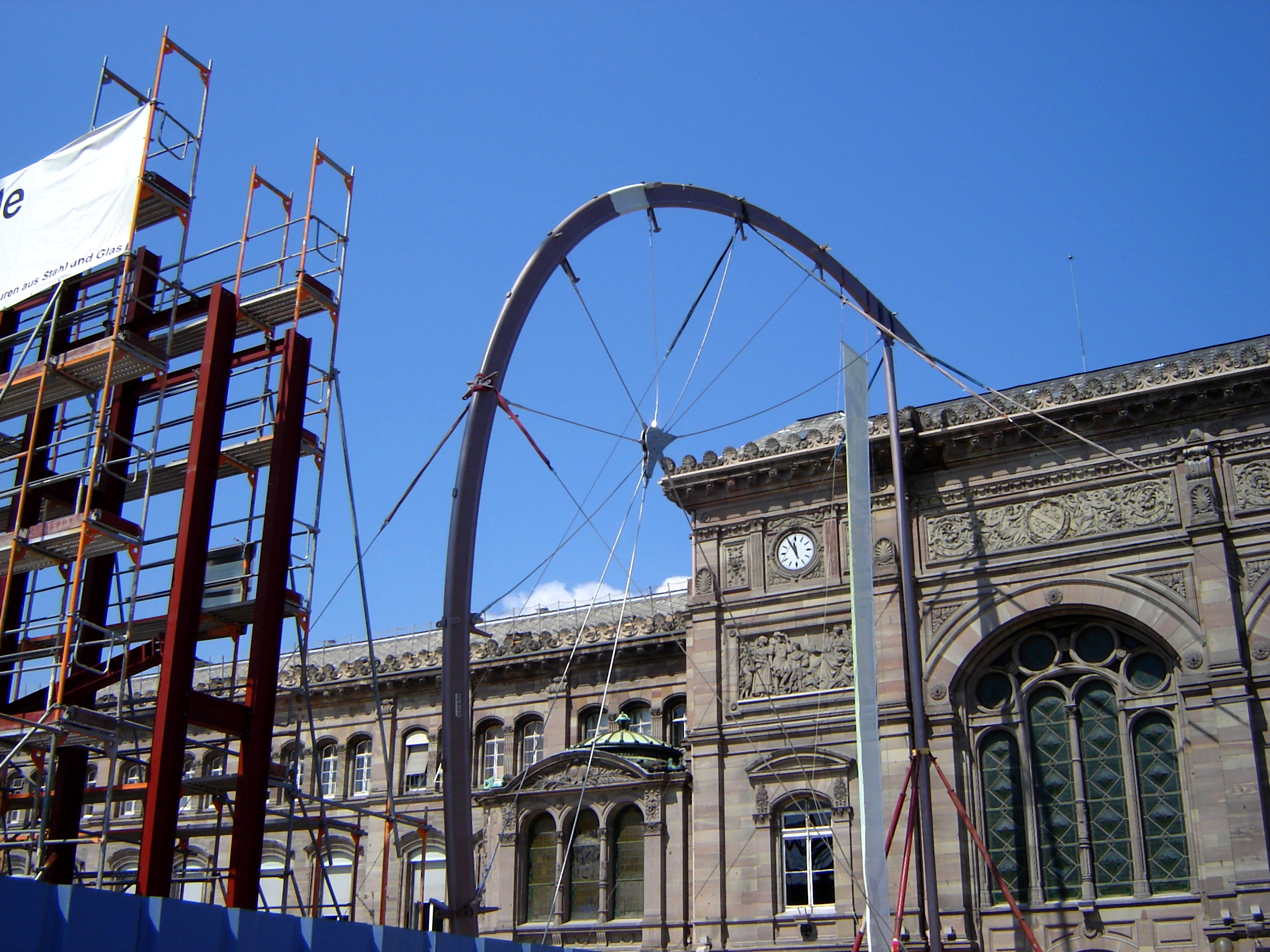 Chantier de la gare de Strasbourg, vue de la place de la gare en 2006